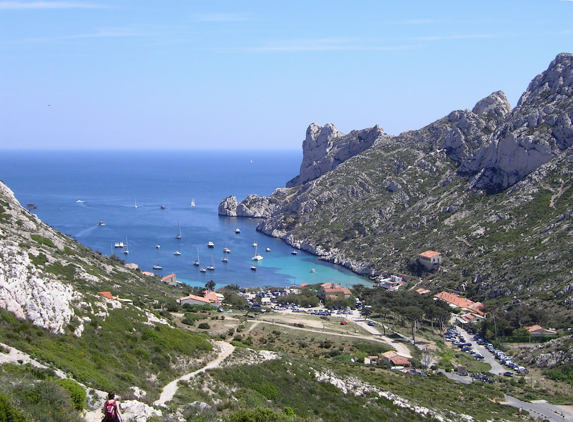 Description: The Calanque de Sormiou near Marseille, France. Source: own picture (Thomas Rosenau, User:Pumbaa80) Date: see metadata section below Other versions: Image:Calanque de Sormiou.jpg, Image:Calanque de Sormiou 2.jpg, Image:Calanque de Sormiou 3.jpg Description: Calanque de Sormiou près de Marseille. Source: Image prise par Thomas Rosenau (User:Pumbaa80) Date: voir ci-dessous (section «Metadata») Autres versions: Image:Calanque de Sormiou.jpg, Image:Calanque de Sormiou 2.jpg, Image:Calanque de Sormiou 3.jpg